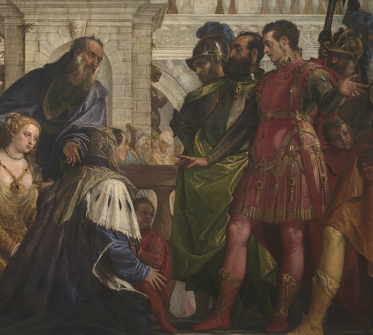 detail